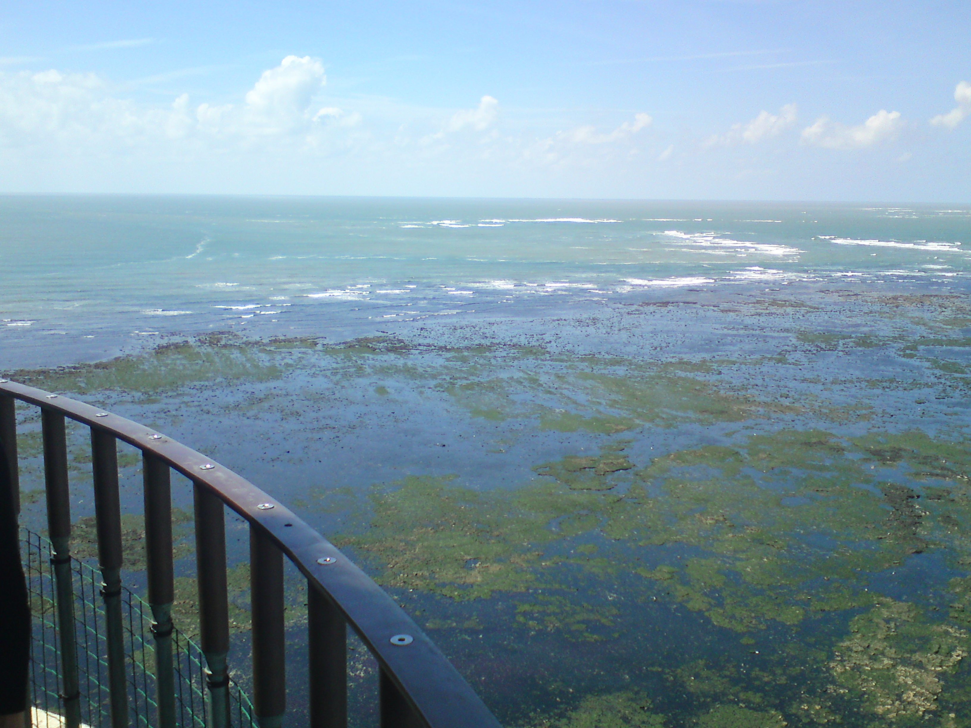 Photo prise à marée basse, le banc de rochers est visible.